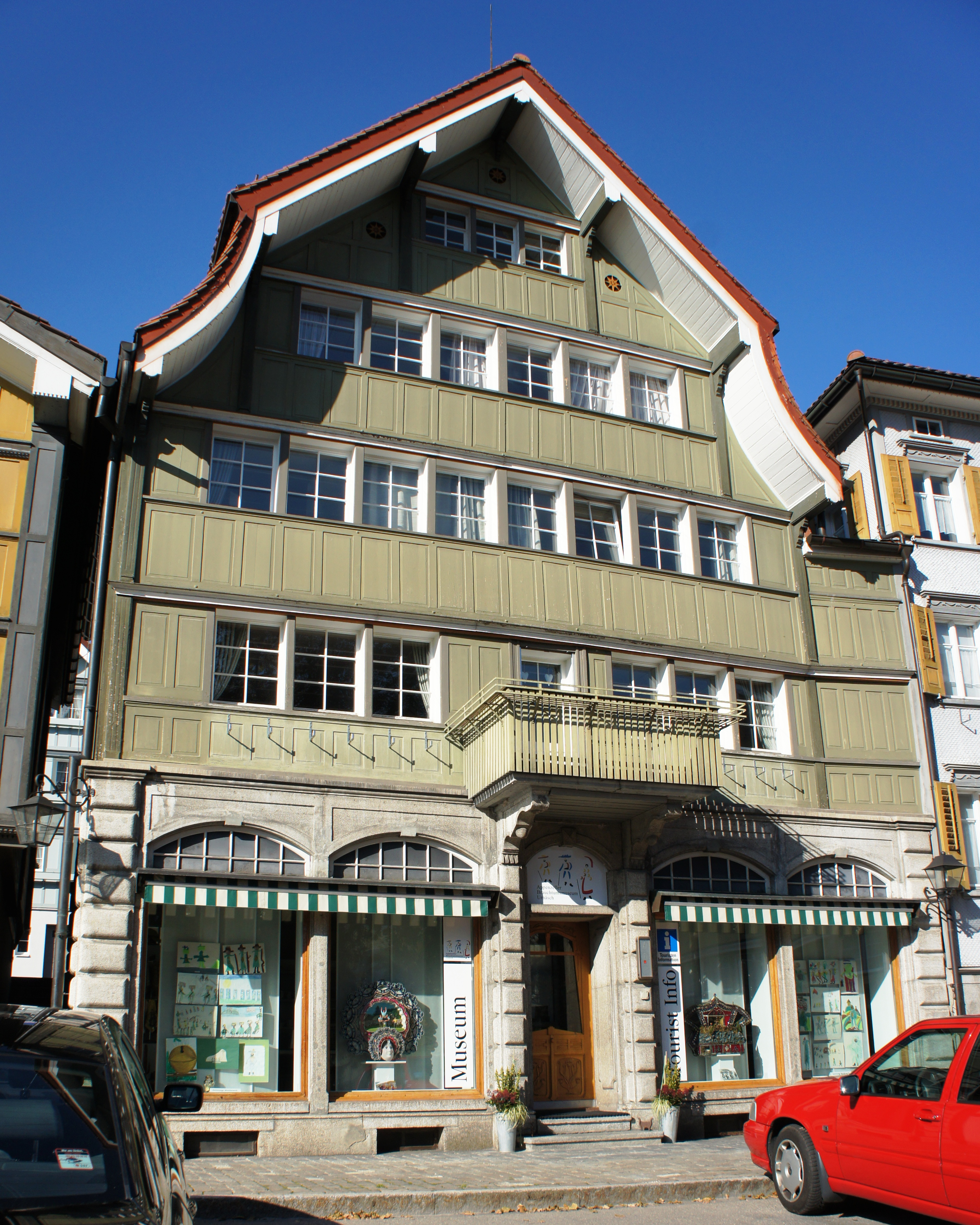 Blick von Süden auf die ehemalige Apotheke am Dorfplatz 8 in Urnäsch. Heute befindet sich der Haupteingang zum Tourismus-Büro und Appenzeller Brauchtumsmuseum in diesem fünfstöckigen Gebäude. Das Erdgeschoss ist gemauert, die oberen Stockwerke sind ein Holzbau, wobei die obersten beiden Stockwerke sich im geschwungenen Giebel befinden. Die Sammlung im Brauchtumsmuseum steht als A-Objekt unter nationalem, das Gebäude als C-Objekt unter kommunalem Schutz.